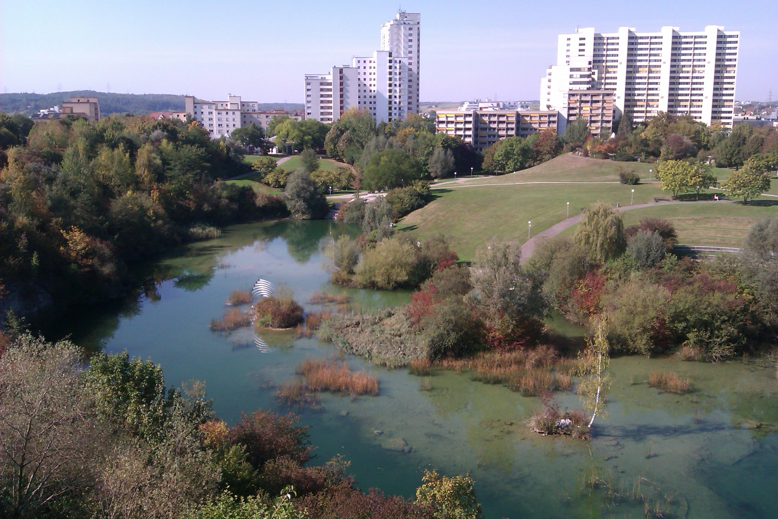 Leonberg Stadtpark, Blick nach Westen